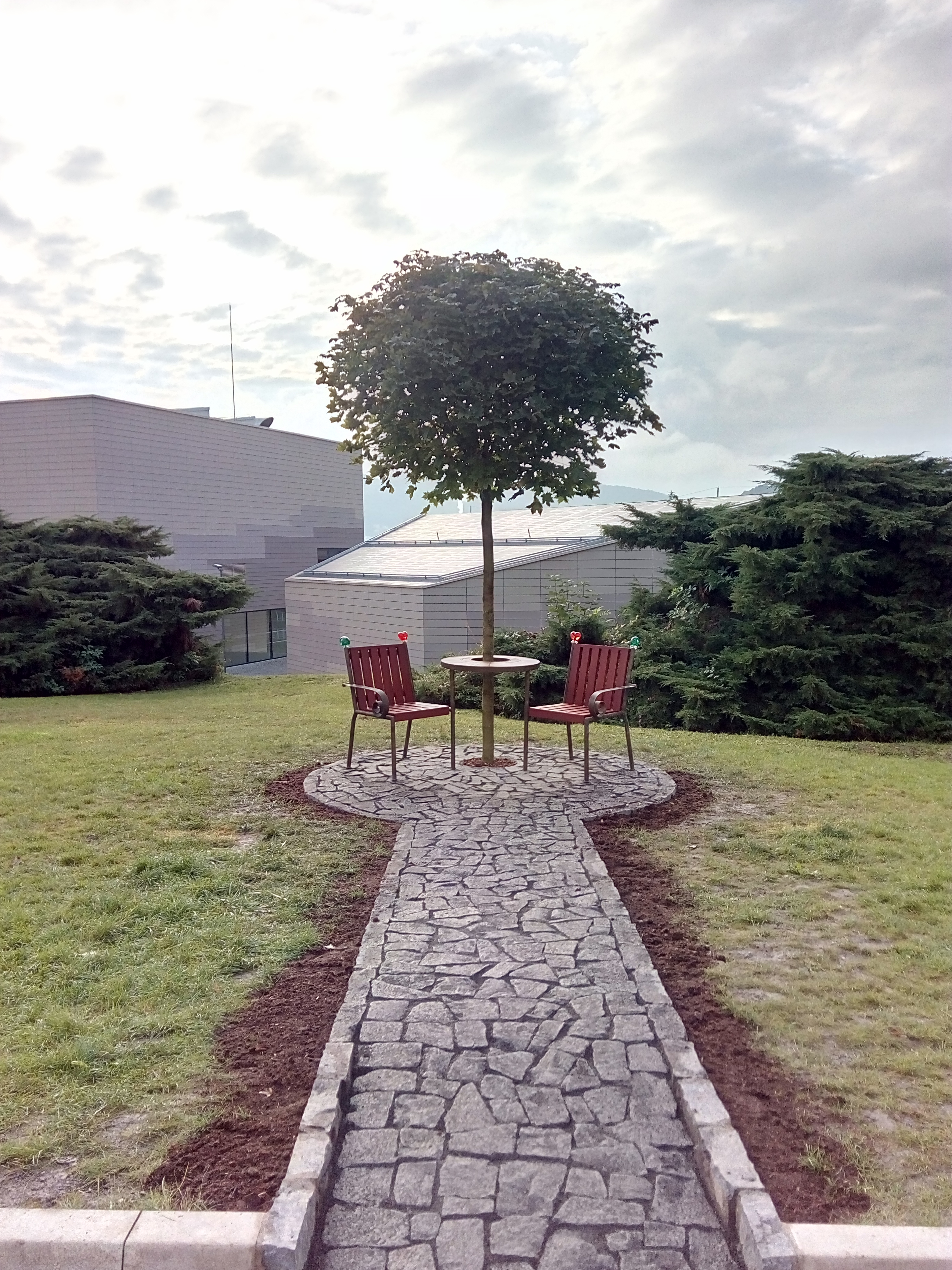 Lavička Václava Havla byla slavnostně odhalena dne 10.10.2016 k příležitosti 10. výročí vzniku Filozofické fakulty UJEP.